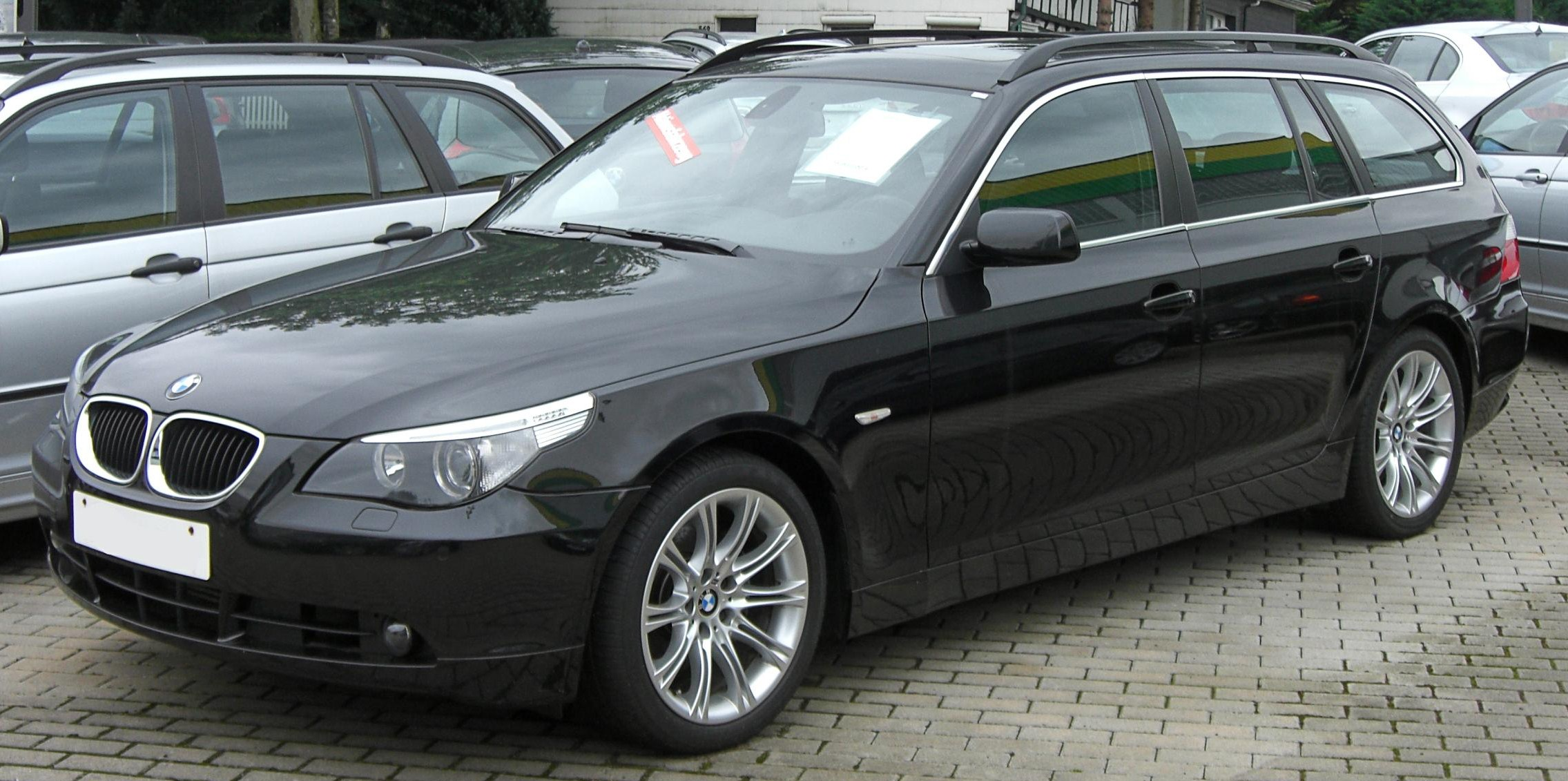 BMW 5er Touring (E61)